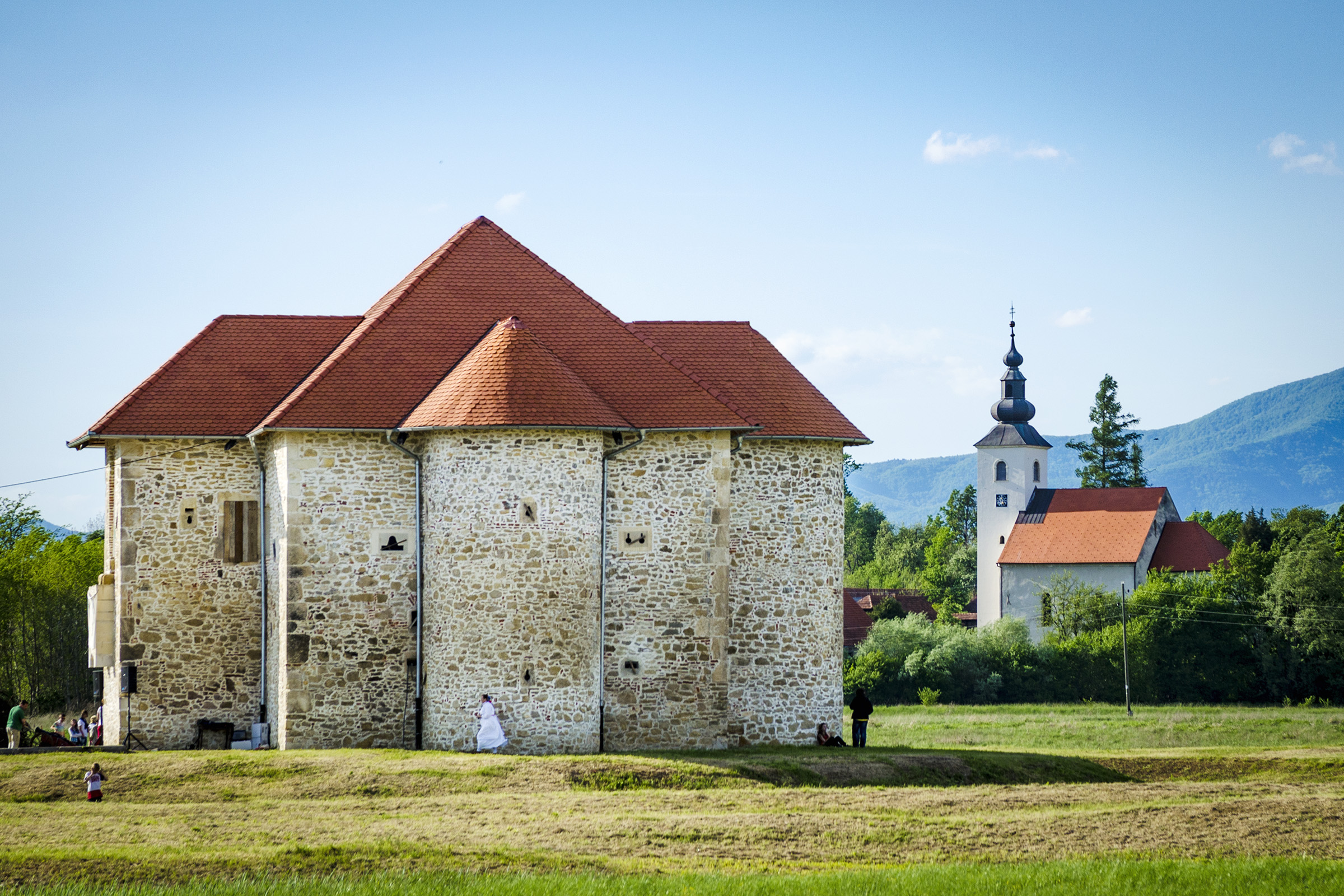 Kaštel Konjskih, Z-3520